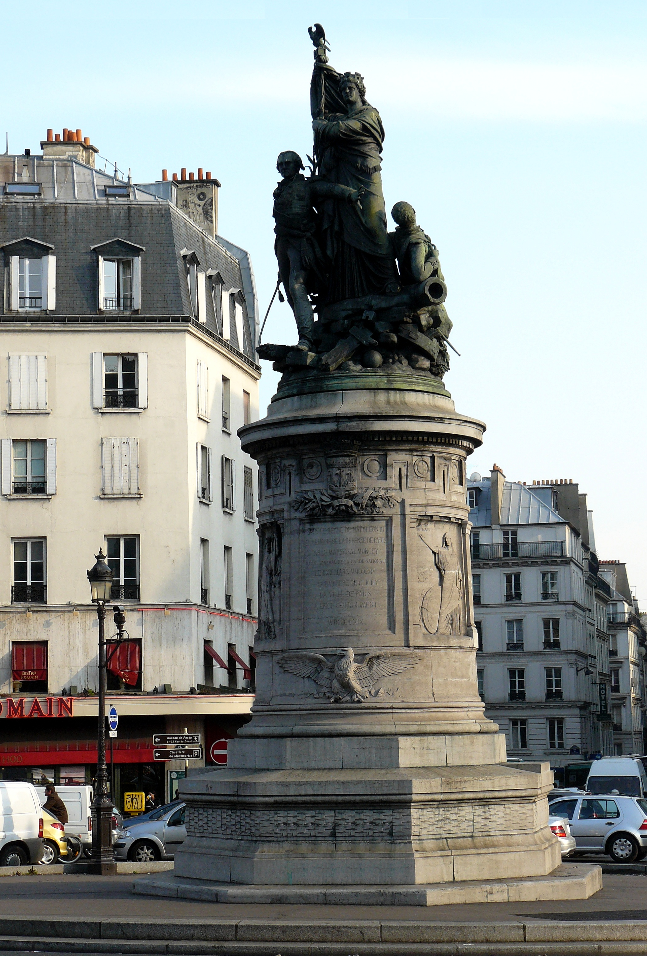 Monument au Maréchal Moncey, sur la place de Clichy, Paris (18ème arrd.) - Groupe en bronze, sculpteur Amédée Doublemard (1870)